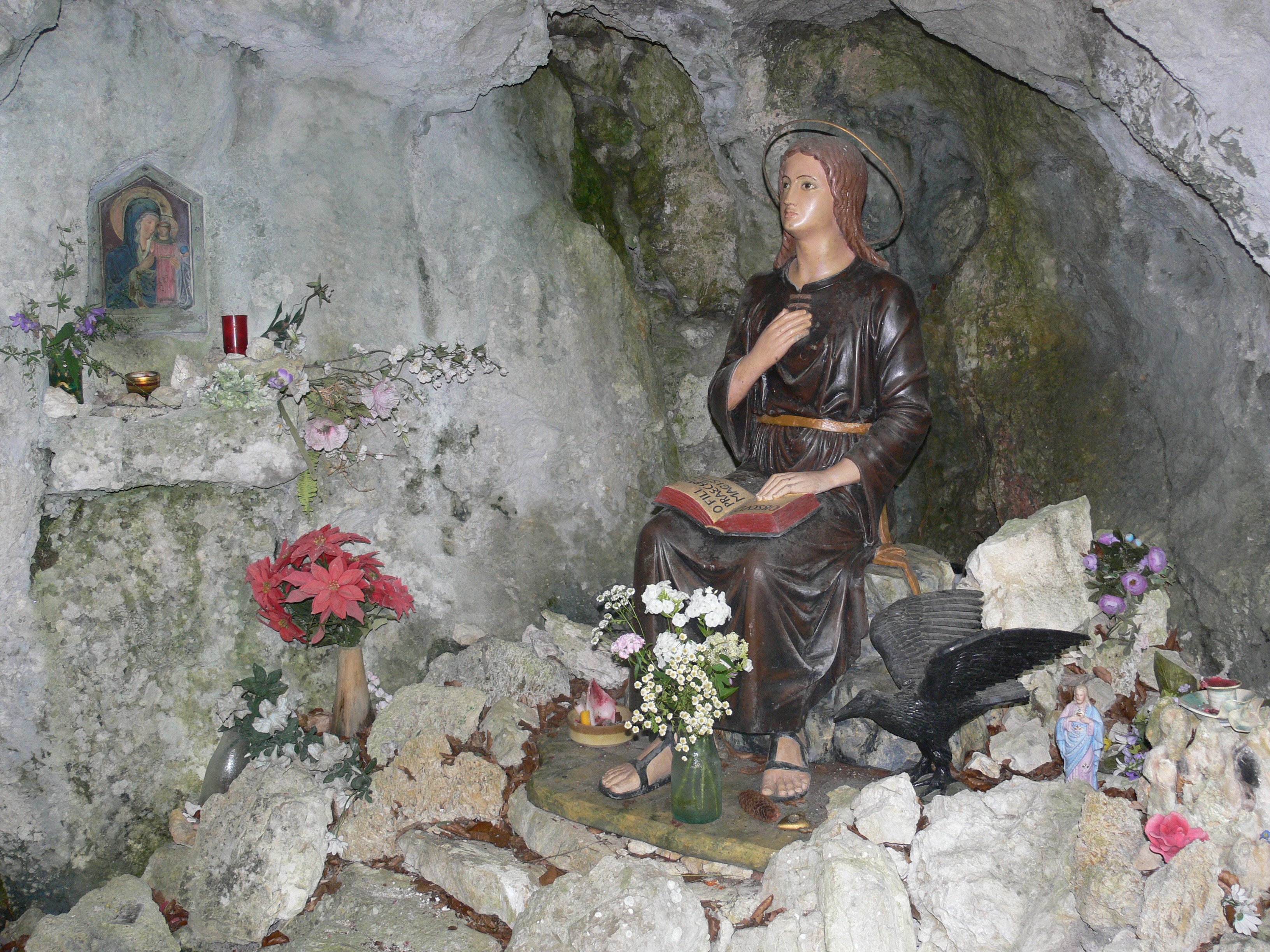 Benedikt(?)-Figur, Benediktushöhle bei Beuron